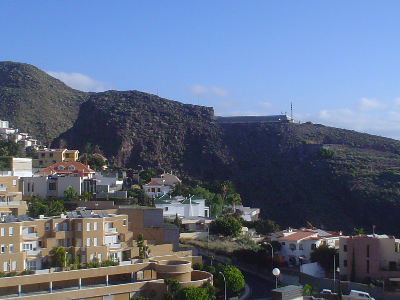 Ifara desde la Residencia Mirador de Ifara